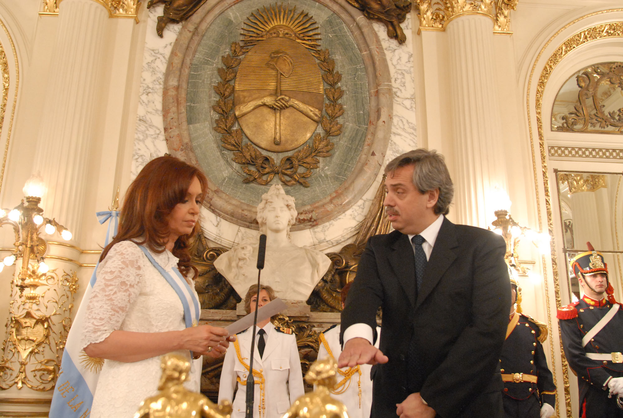 La presidenta Cristina Fernández toma juramento al jefe de Gabinete de ministros, Alberto Fernández.